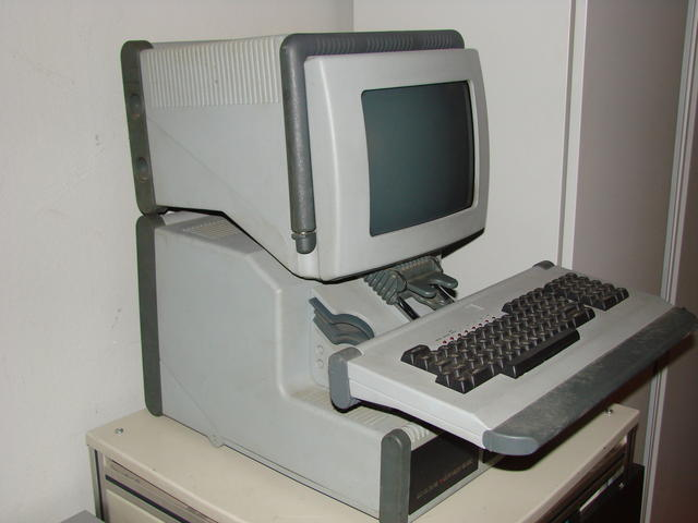 Iskra Dela Triglav.